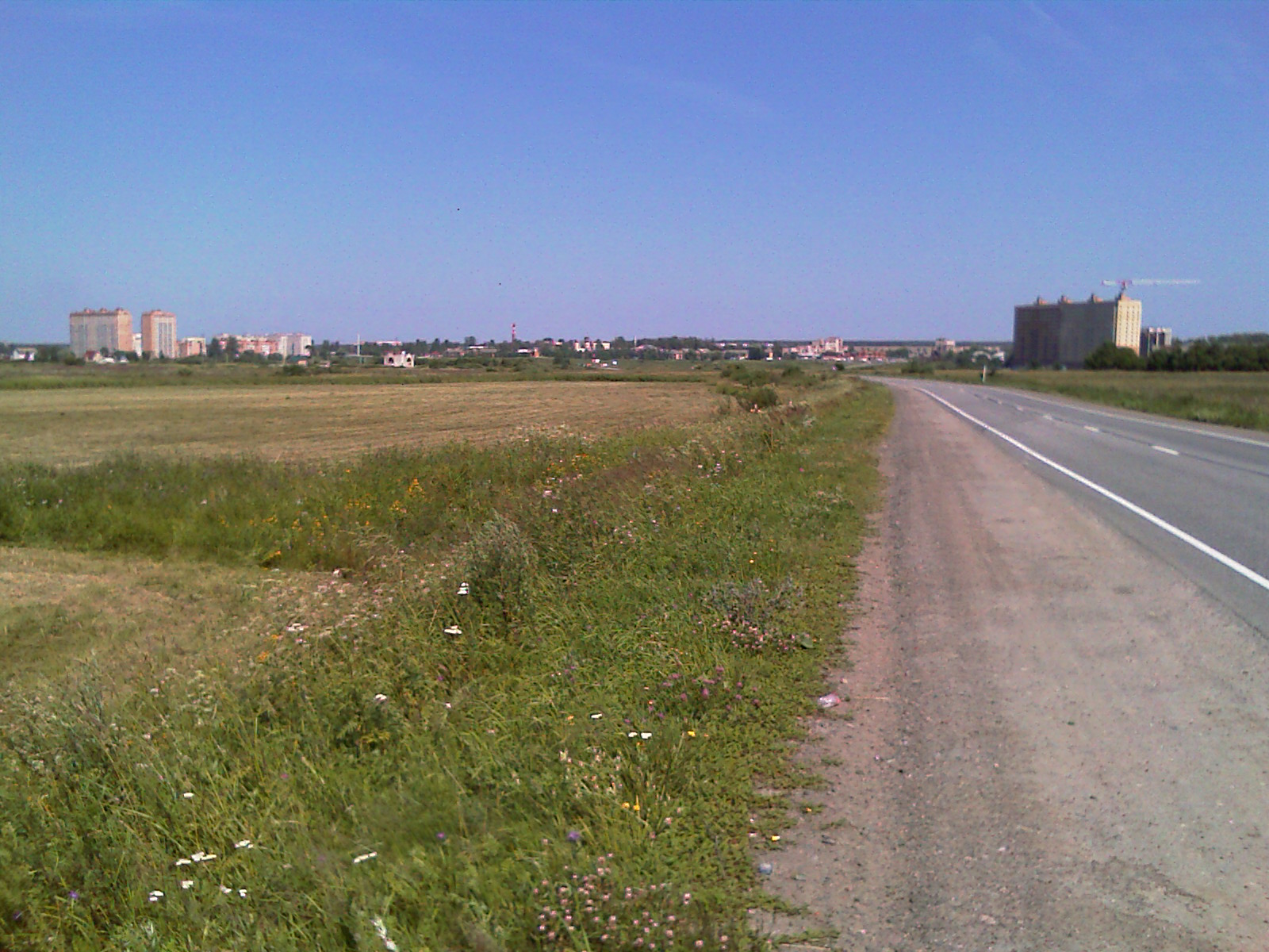 Nikolskoye town general view summer 2014